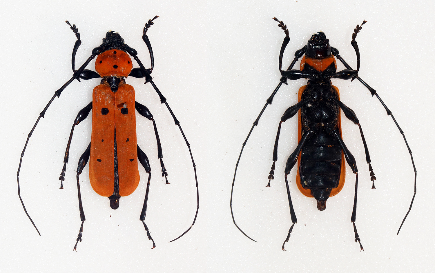 Lameere,1887 Sex: Male Data: None Size: 30mm